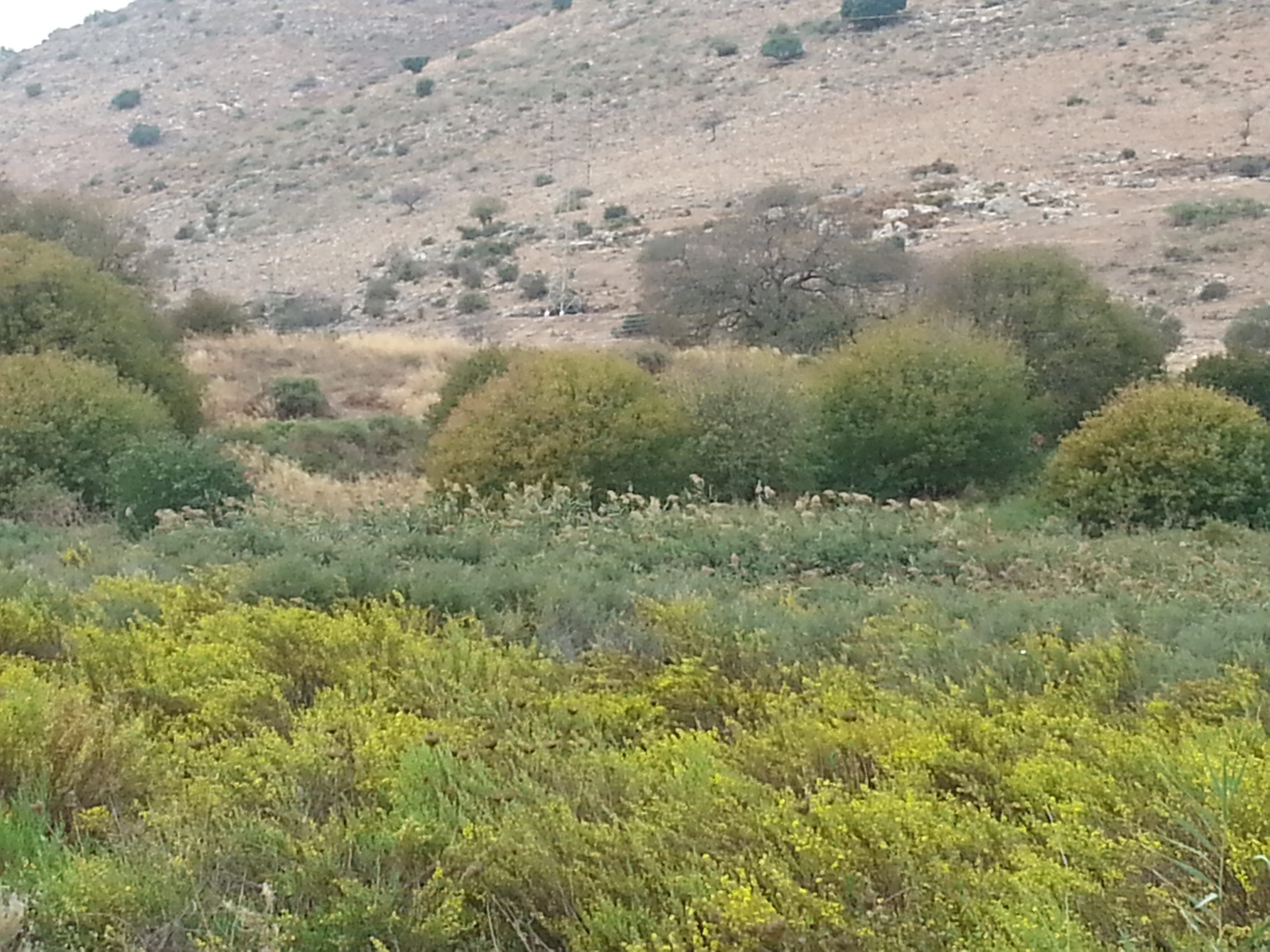 תל תאו מראה כללי